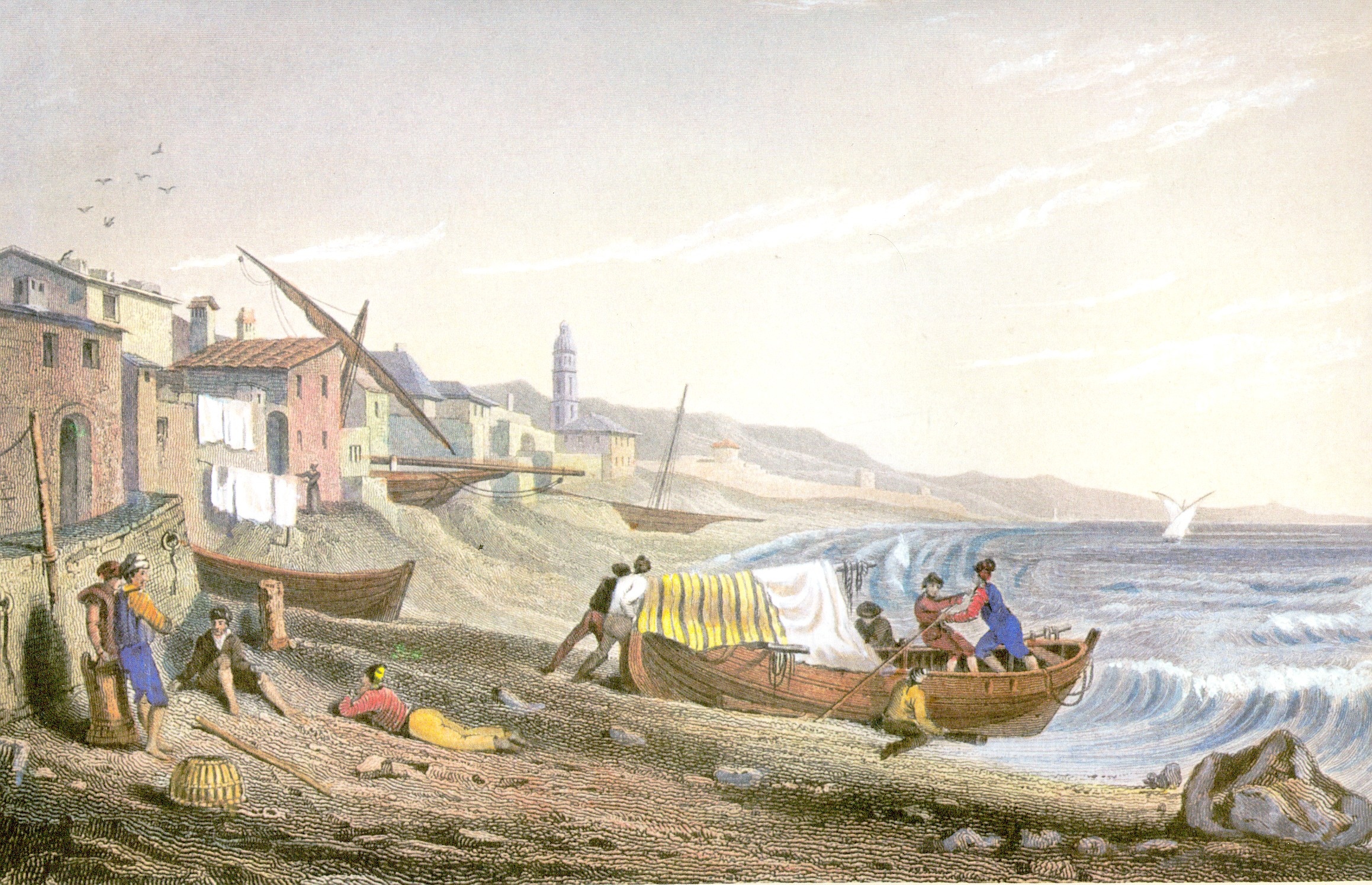 Cogoleto (provincia di Genova, Liguria, Italia) in un'incisione in acciaio del 1829.